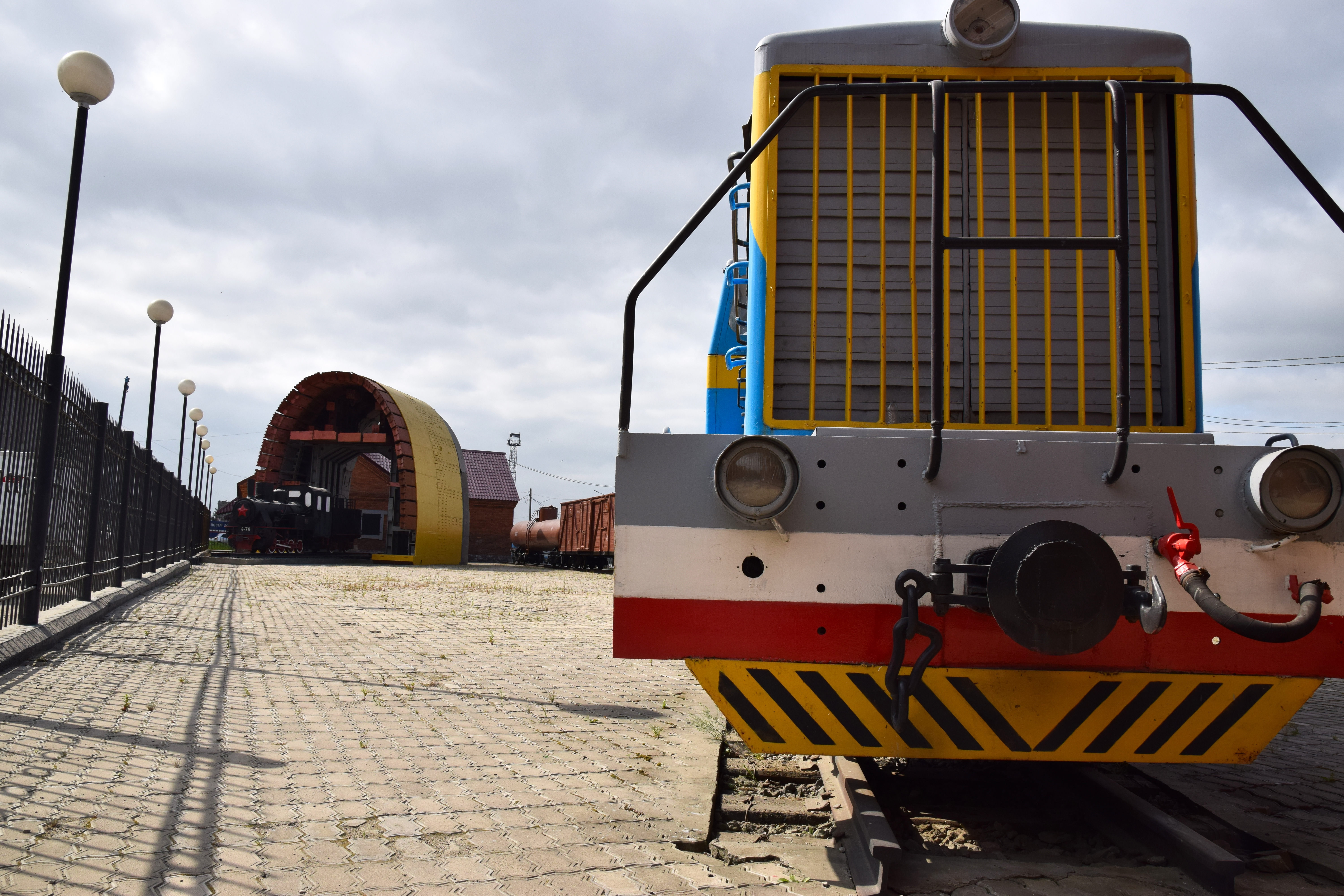 Площадка с техникой музей сахалинской ж/д